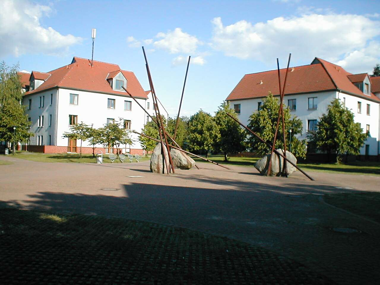 Student Village in Babelsberg am Griebnitzsee, Potsdam.